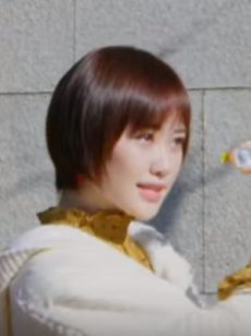 早見初美花 / ルパンイエロー